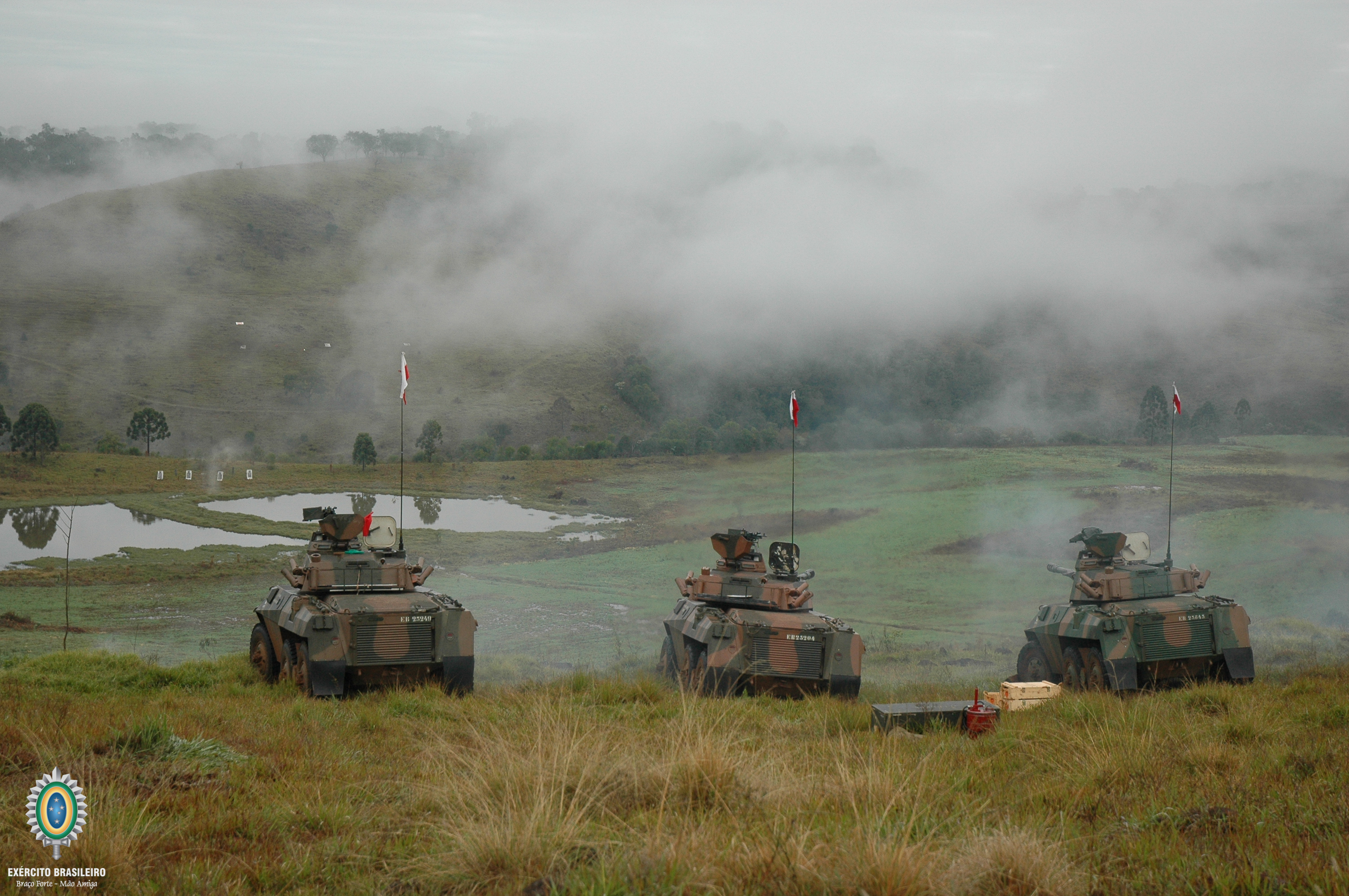 Cavalaria